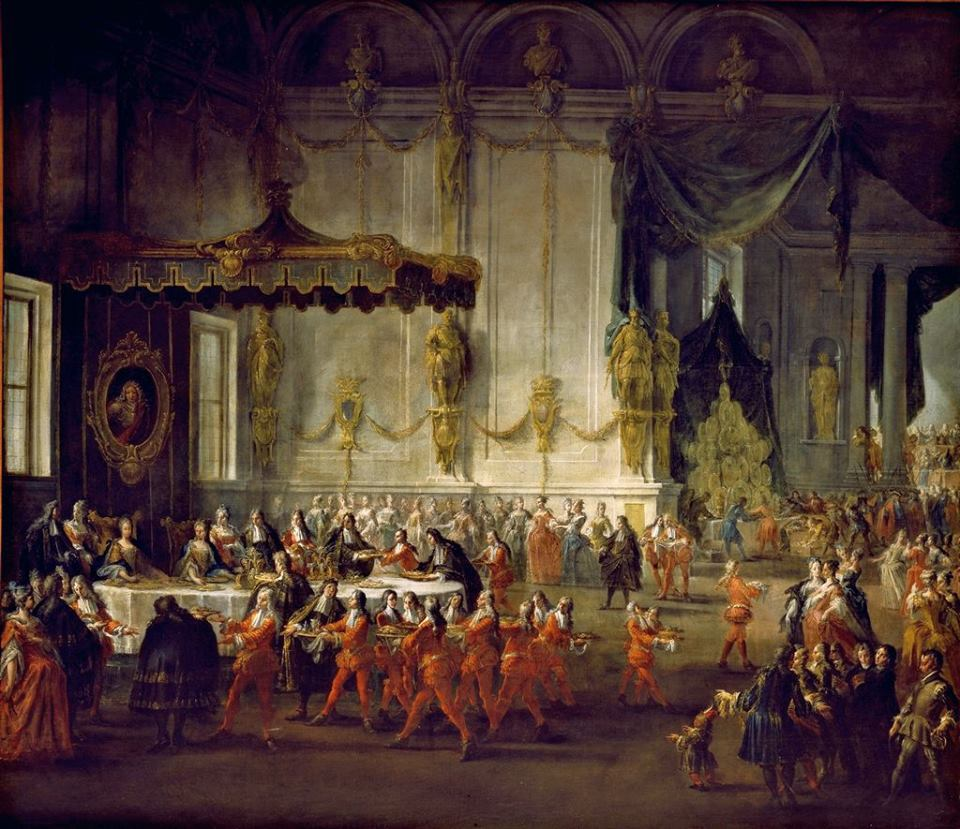 Convitto nuziale di Elisabetta Farnese